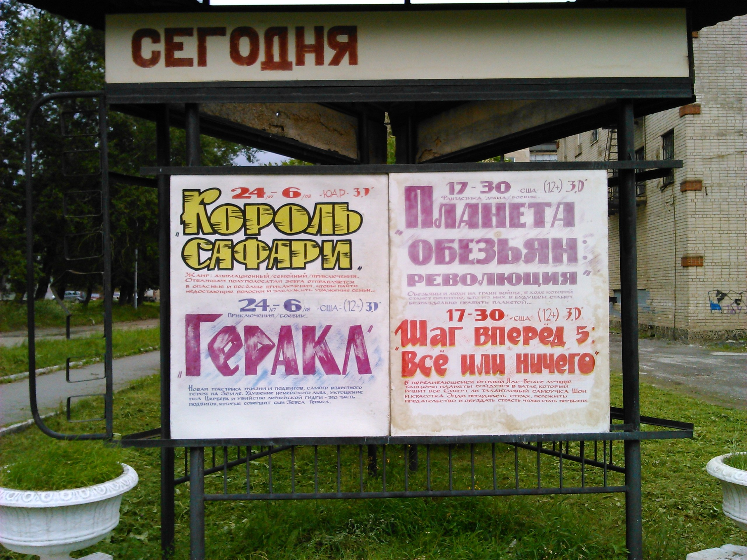 Афиша у кинотеатра "Азов", г. Полевской